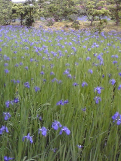 大田ノ沢のカキツバタ群落を撮影